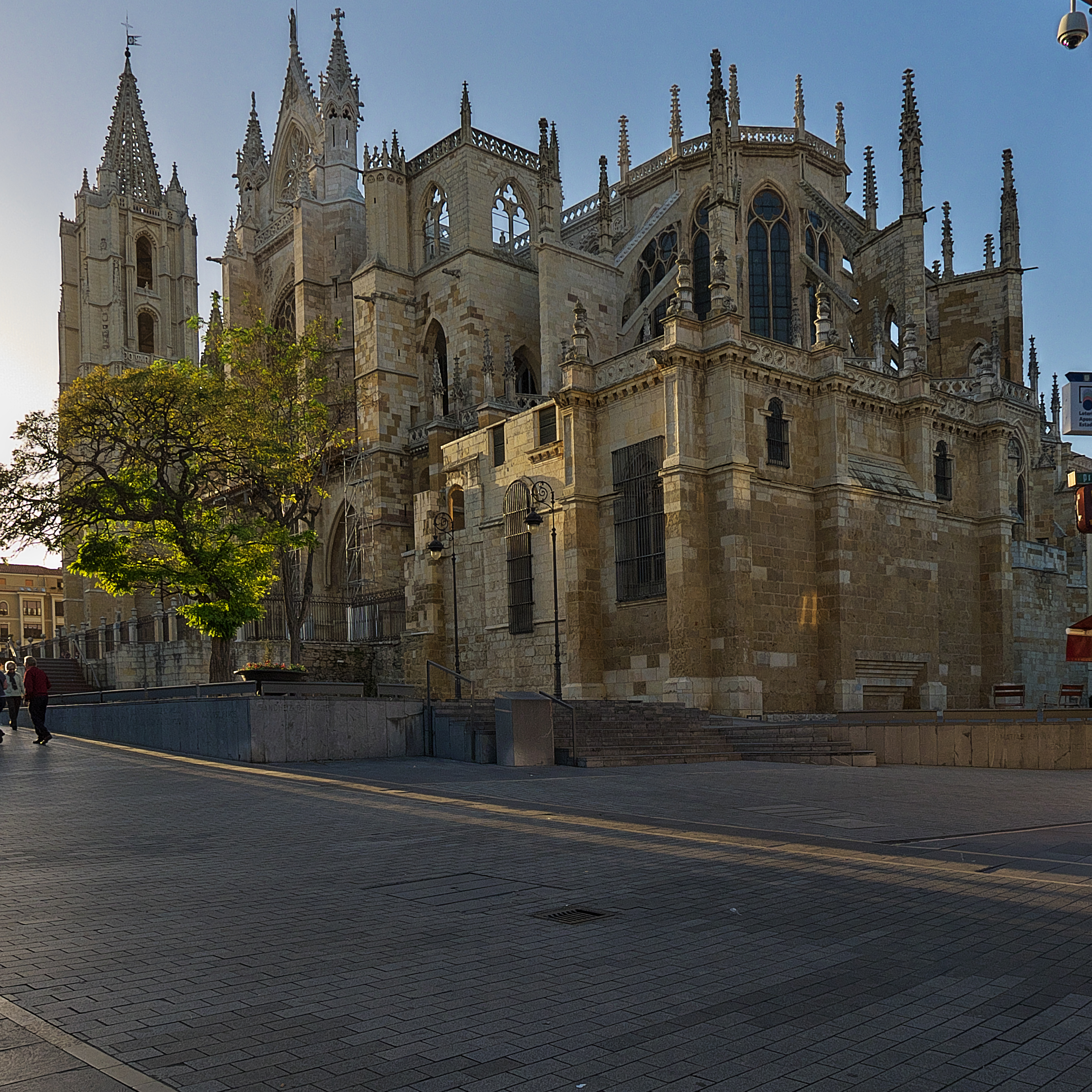 A comienzos del siglo XIII el Reino de León comprendía desde Galicia y Asturias hasta el norte de Extremadura.